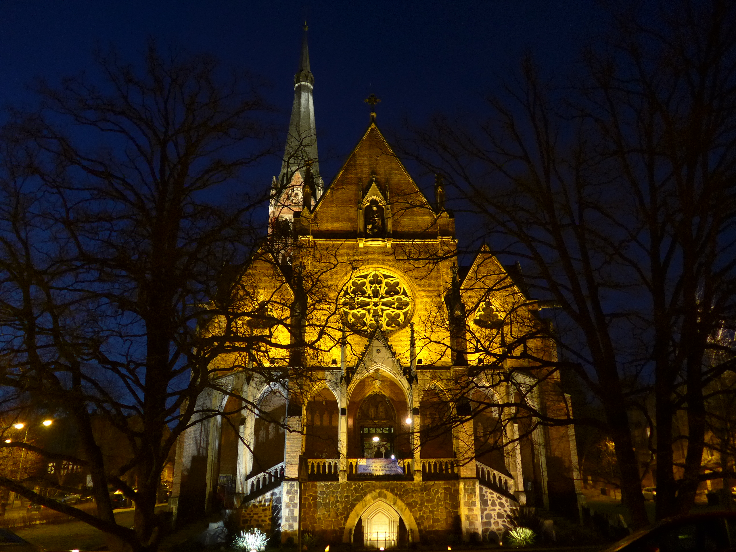 Večerní kostel sv. Alžběty v Teplicích, jižní pohled na portál